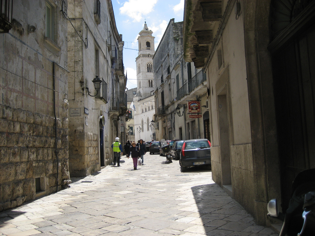 Approaching the Cattedrale di Santa Maria Assunta di Altamura [Altamura, Italy]